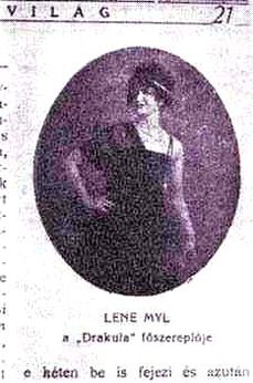 Lene Myl in Drakula halála (1921)